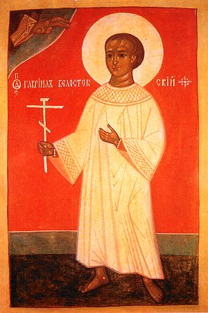 Икона мученика Гавриила Белостокского